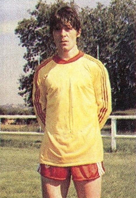 Robert Pintenat en 1979 à l'US Toulouse (futur TFC, premier capitaine et meneur de jeu), 'Panini Football 80', Panini figurina n°569.